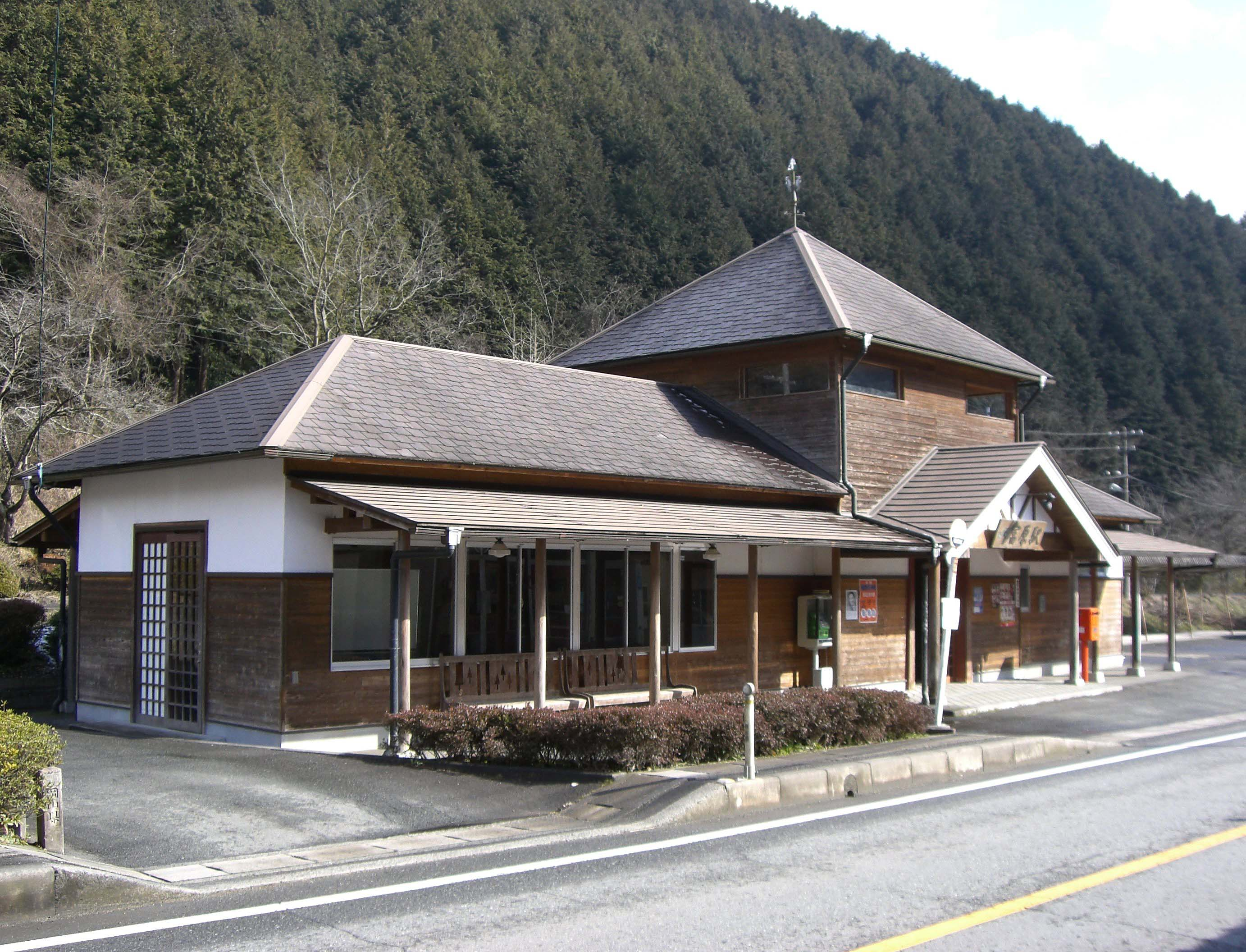 富原駅の駅舎